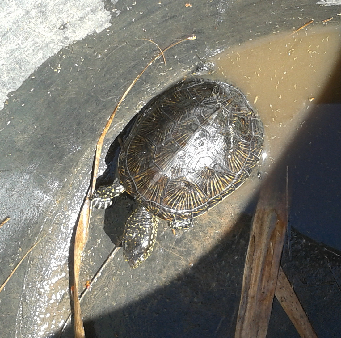 Voluntariat ambiental per al seguiment de la tortuga d'estany a la Marjal de Rafalell i Vistabella, cria d'Emys capturada per al marcatge i seguiment